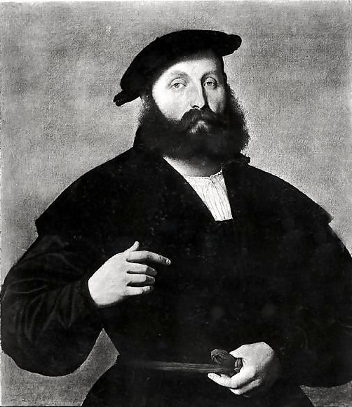 Bildnis des Grafen Raimund Fugger um 1525 Staatliche Museen zu Berlin